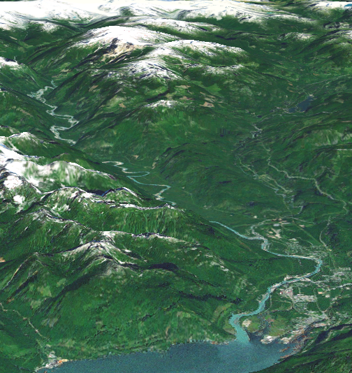 L'embouchure de la Squamish et la ville de Squamish, au nord de Vancouver, au Canada.